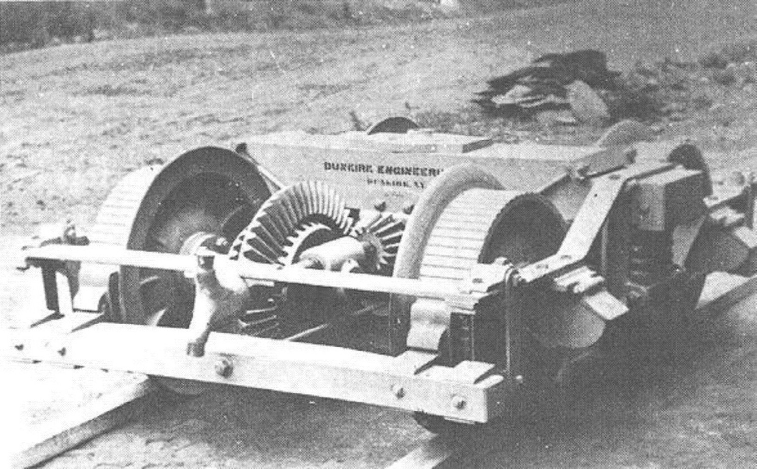 Drehgestell einer Waldbahnlokomotive nach dem Patent von George D.Gilbert gebaut von der Dunkirk Engineering Company in Dunkirk im Bundesstaat New York. Es ist deutlich das Achsdifferential zu erkennen, sowie die Räder, die für den Betrieb auf einfachsten Holzschienen ausgelegt sind.